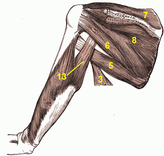 #3 correspond au muscle grand dorsal. (Latismus Dorsi) #5 correspond au muscle grand-rond. (Teres Major) #6 correspond au muscle petit-rond. (Teres Minor) #7 correspond au muscle supra-épineux. (Supraspinatus) #8 correspond au muscle infra-épineux. (Infraspinatus) #13 correspond à la longue portion du triceps. (Long Head of the Triceps) names replaced by numbers